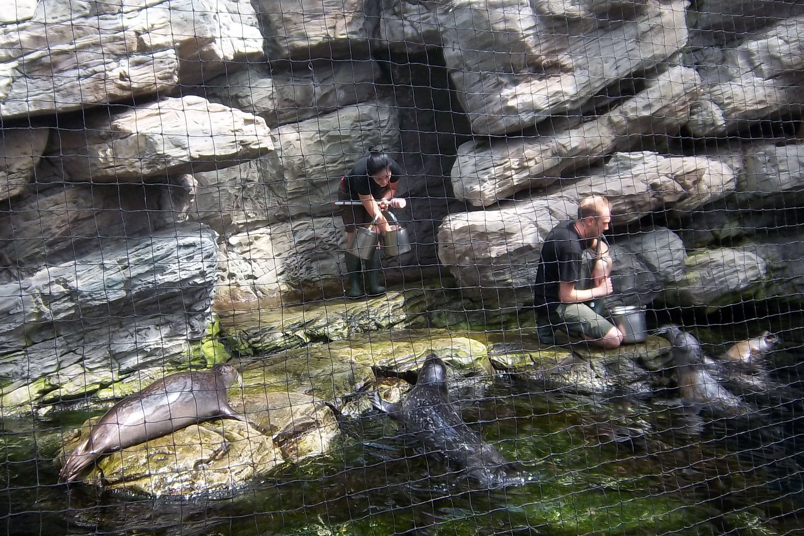 Acquario di Genova, Italy